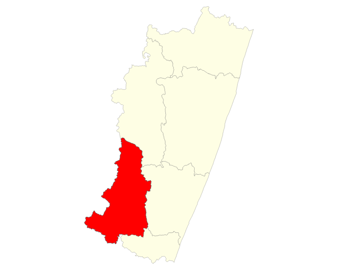 Localisation du district d'Ikongo dans la région Vatovavy-Fitovinany